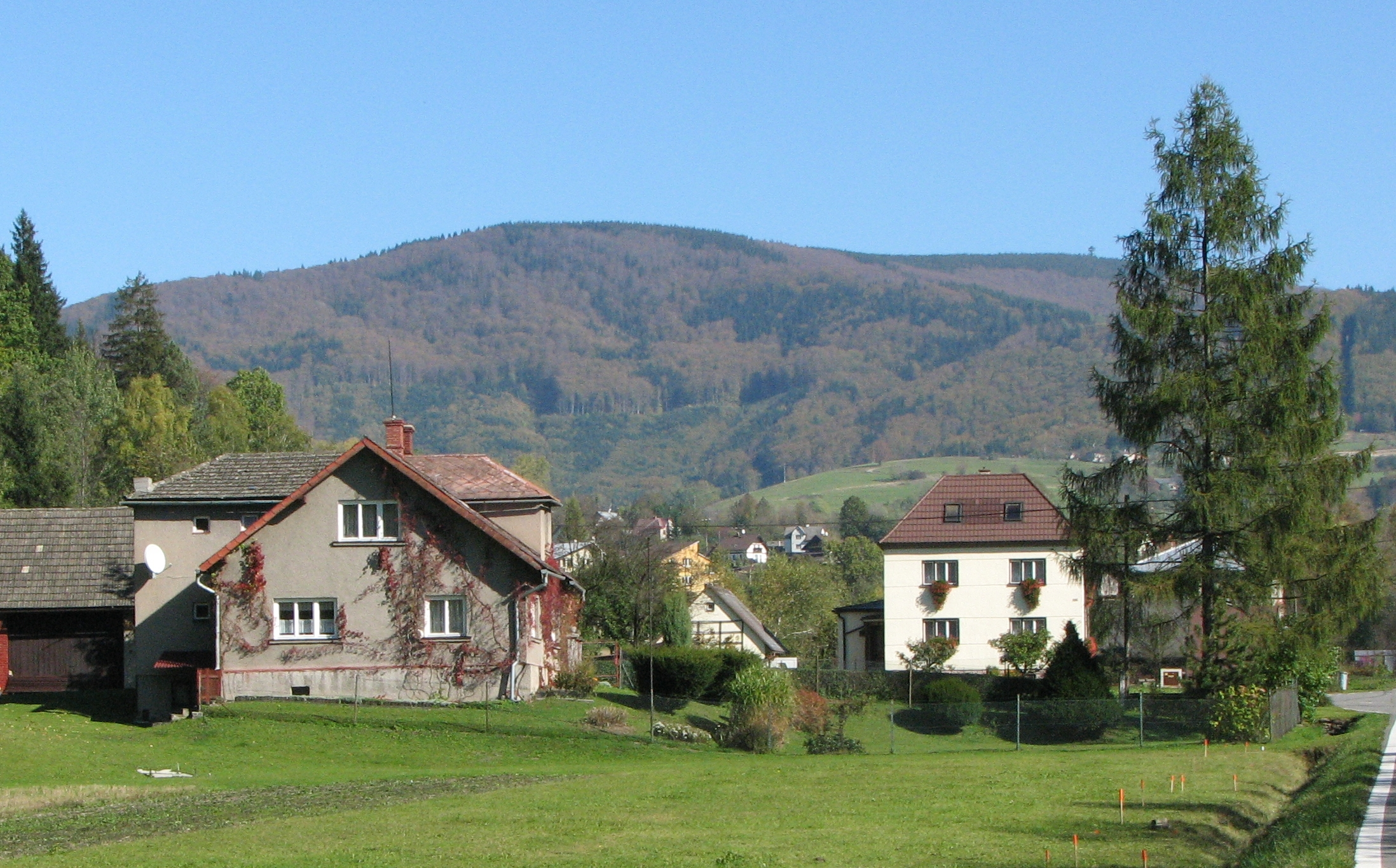 Czantoria, Nydek